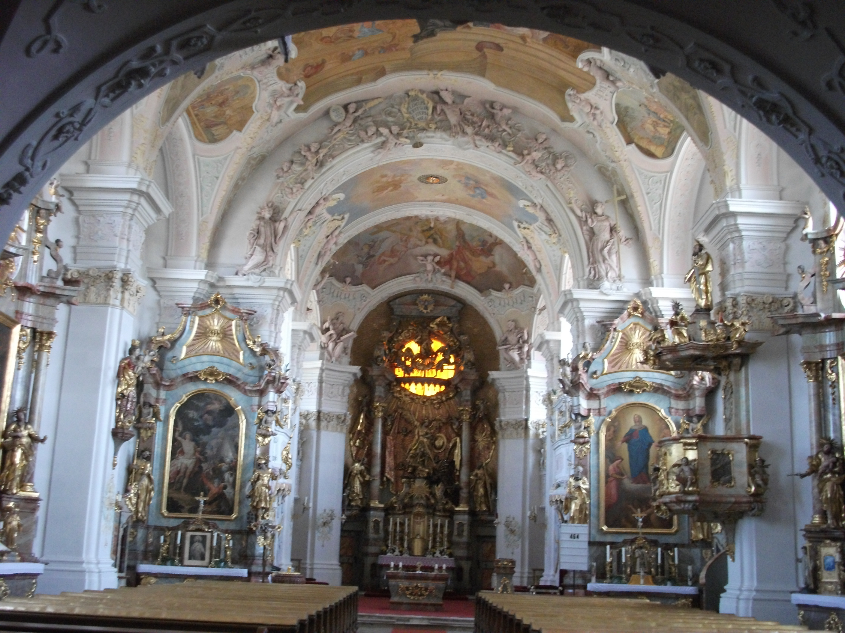 Barocker Kirchenraum